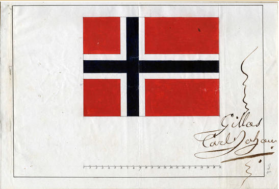 Norges flagg godkjent av Karl Johan i 1821